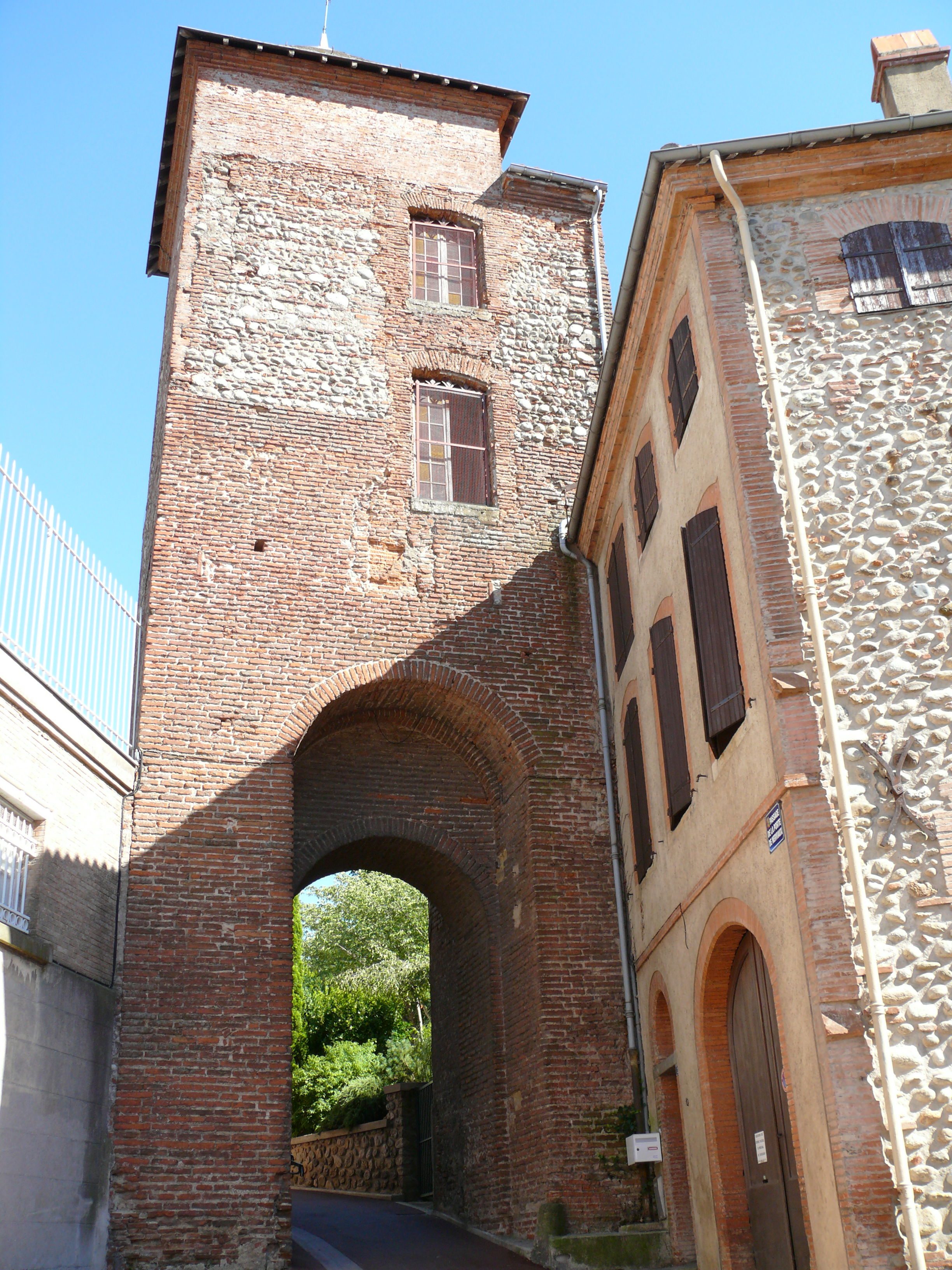 Pamiers (Ariège, France) - Porte de Nerviau.